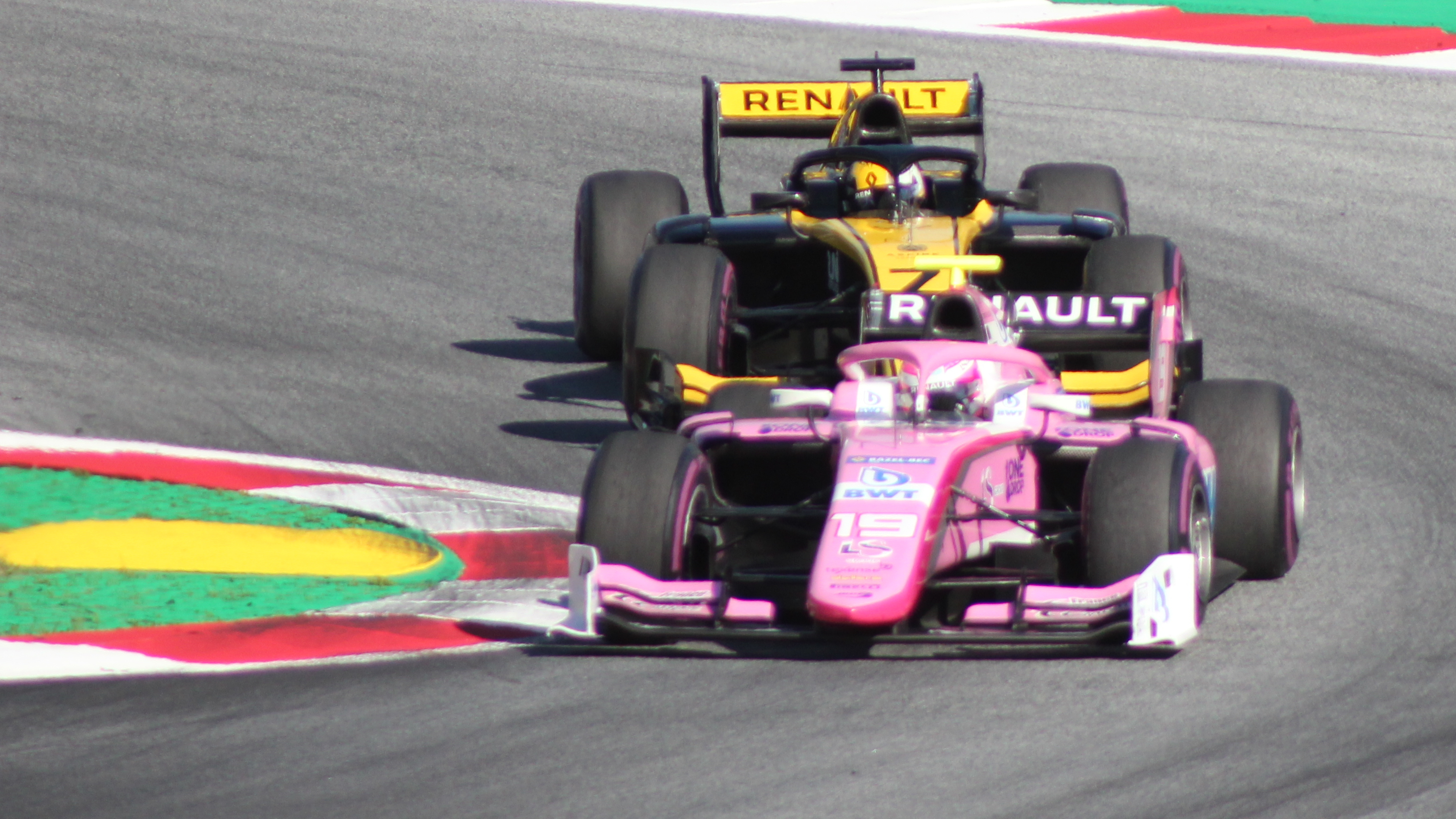 Hubert, gefolgt von Zhou, beim Rennwochenende in Österreich 2019